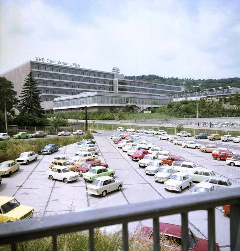 ADN-ZB Franke 28.7.78 Interkosmos In dem Mittelpunkt der durch die Kosmosforschung zu lösenden Aufgaben steht die Nutzung für die Belange der Volkswirtschaft. Diese Aufgabe wurde vom VEB Carl Zeiss Jena in enger Zusammenarbeit mit dem Institut für kosmische Forschung Moskau mit der Entwicklung und dem Bau der sechskanaligen Multispektralkamera MKF-6 gelöst. Die erste einsatzfähige MKF-6 wurde UdSSR zum Einbau in das Raumschiff Sojus 22 im Jahre 1976 als Beitrag der DDR zur Realisierung der Interkosmos-Aufgaben übergeben.